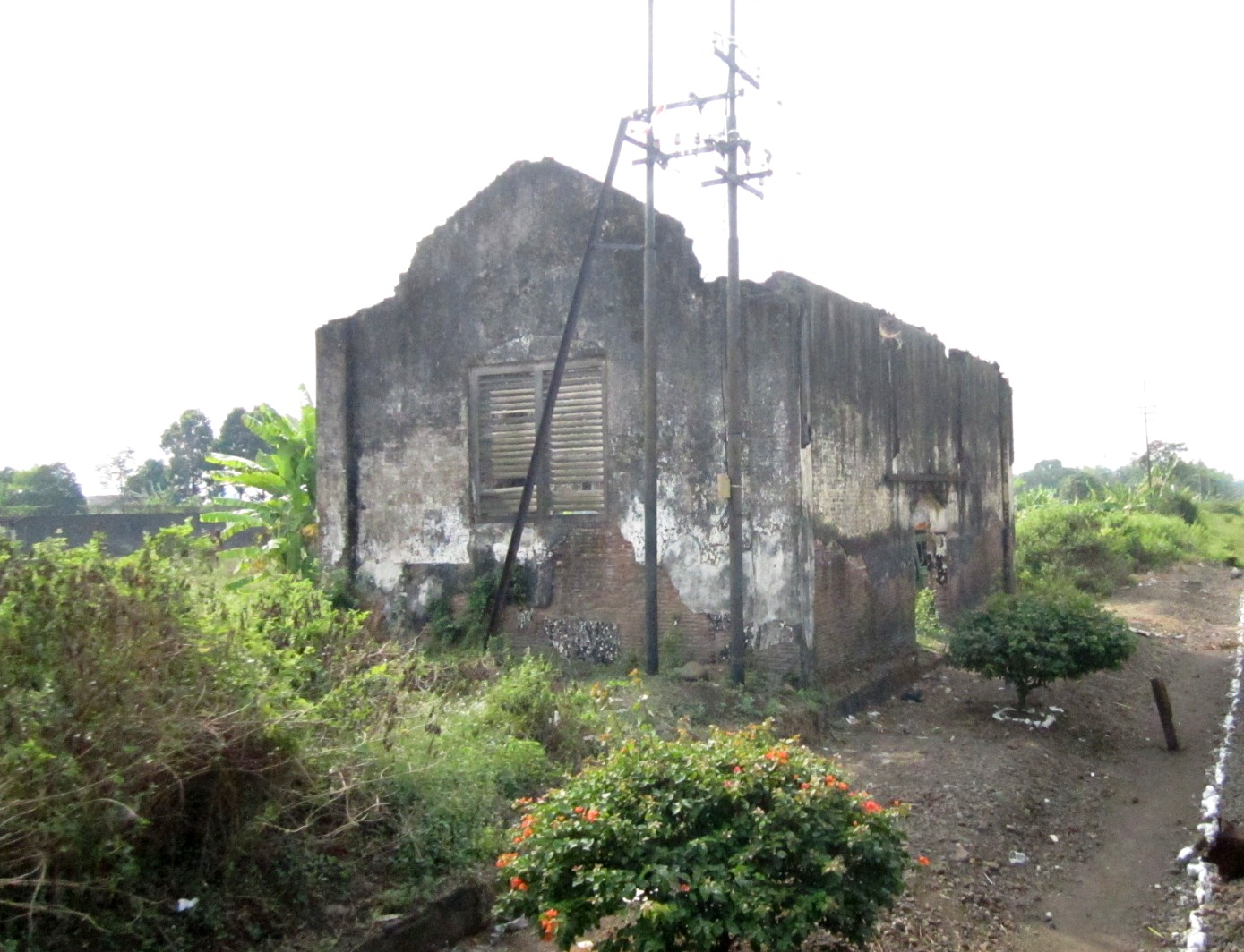 Bekas bangunan Stasiun gununggangsir.